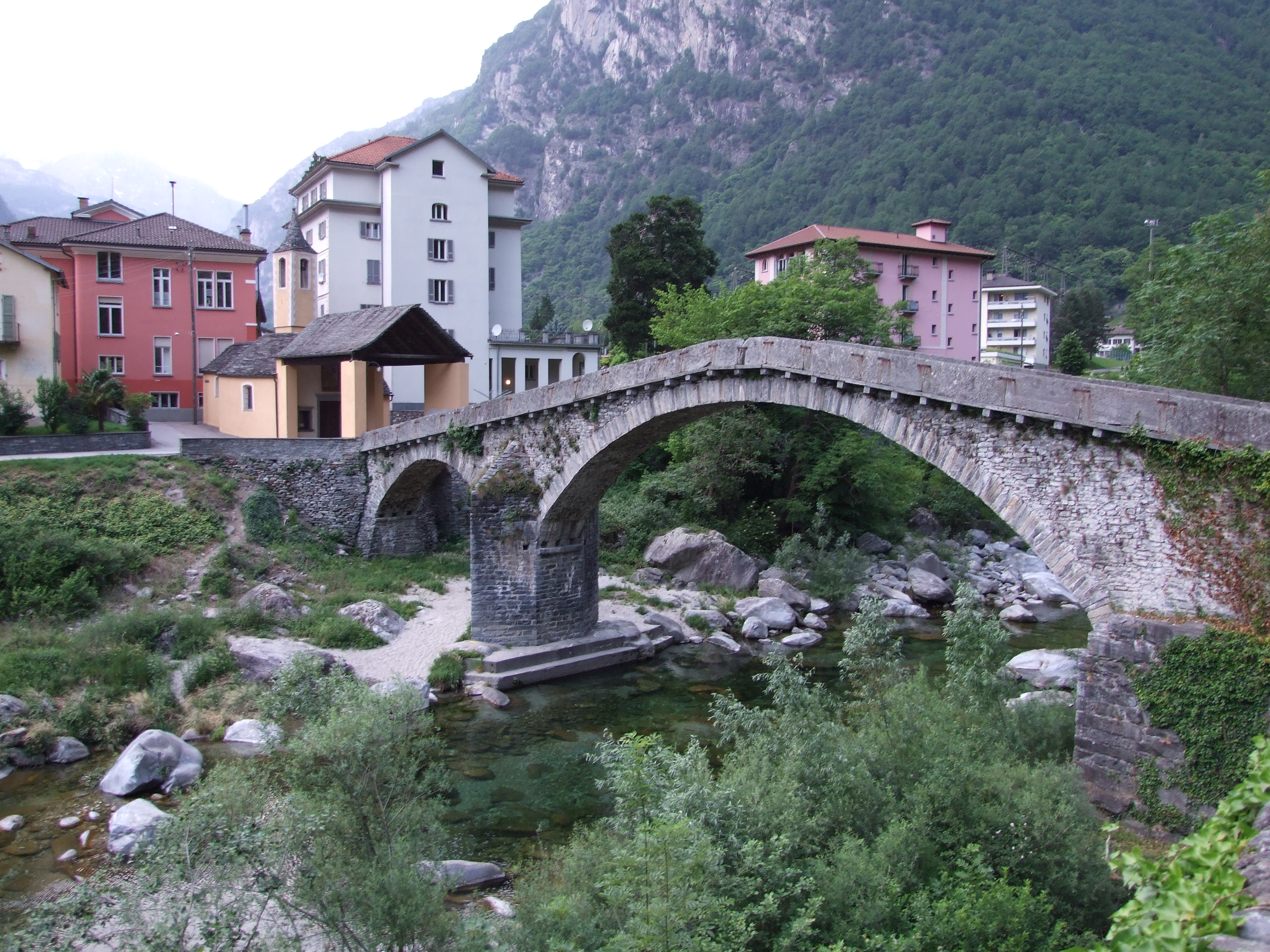 alte Steinbrücke in Bignasco